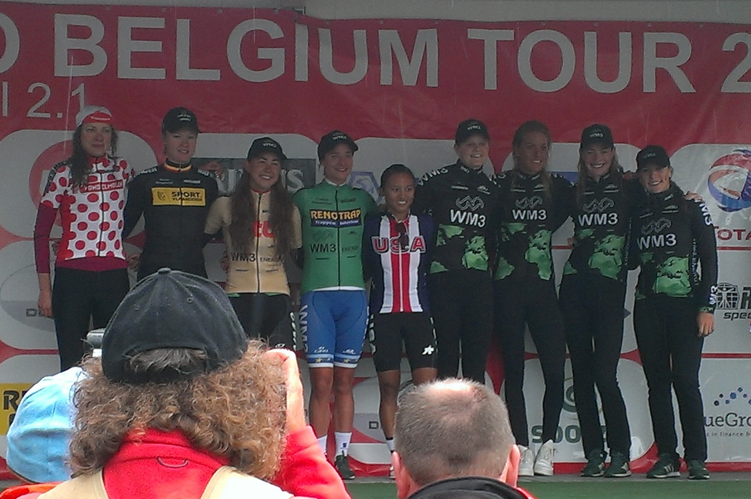 Huldiging van de winnaars van de Lotto Belgium Tour 2017 in Geraardsbergen. Bergklassement: Vita Heine Beste Belgische: Jolien D'Hoore Algemeen en jongerenklassement: Anouska Koster Puntenklassement: Marianne Vos Strijdlust slotrit: Coryn Rivera Ploegenklassement: WM3 Pro Cycling